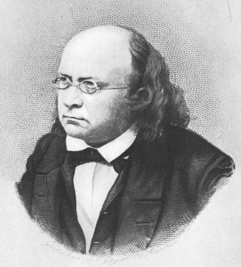 Karl Friedrich Schimper um 1866. Stich von C. Geyer.